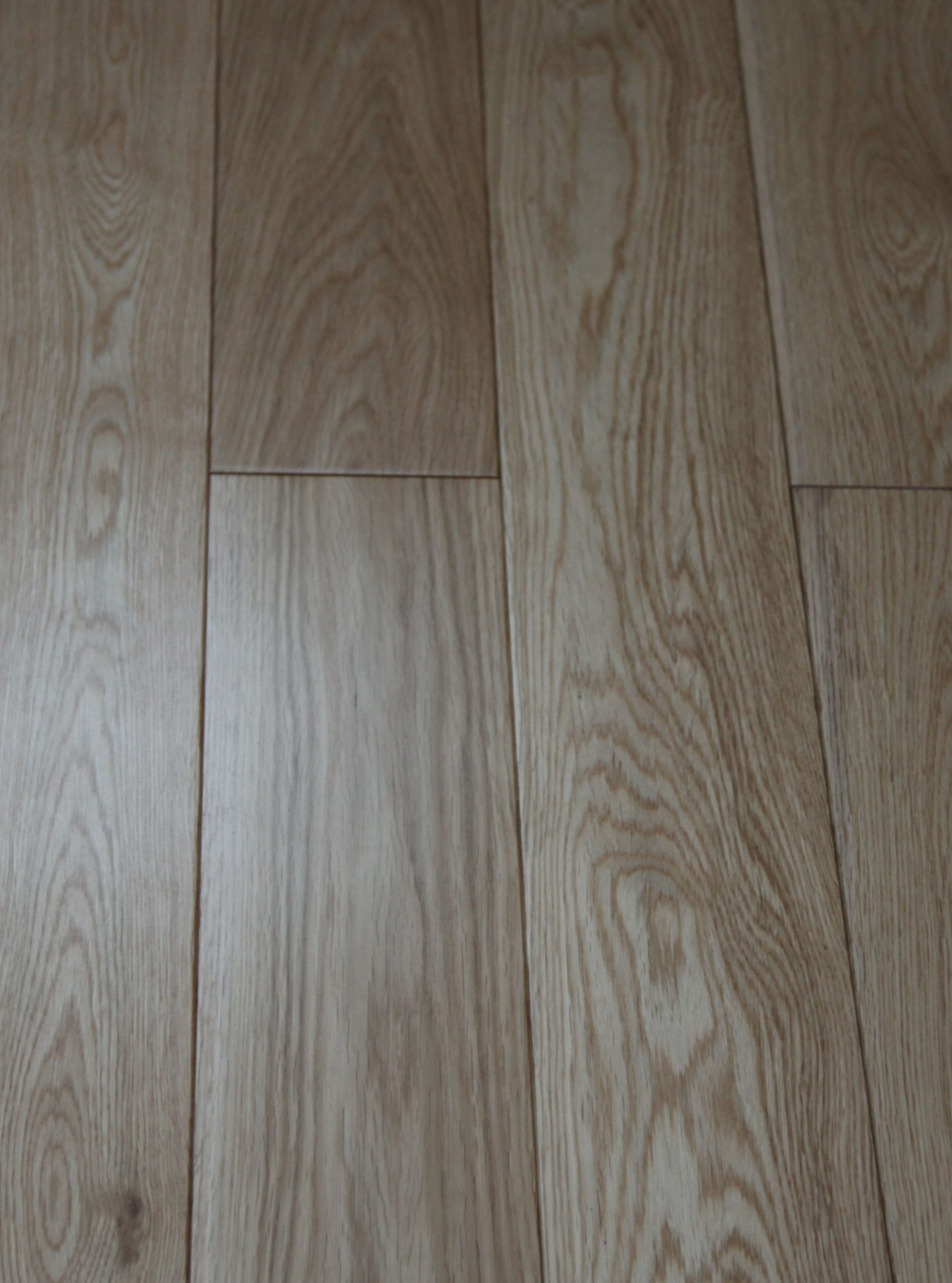 Дуб натуральный сортности AB - вариант второй